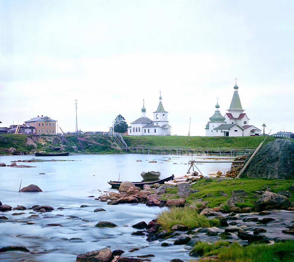 Shuyeretskoe village near Kem